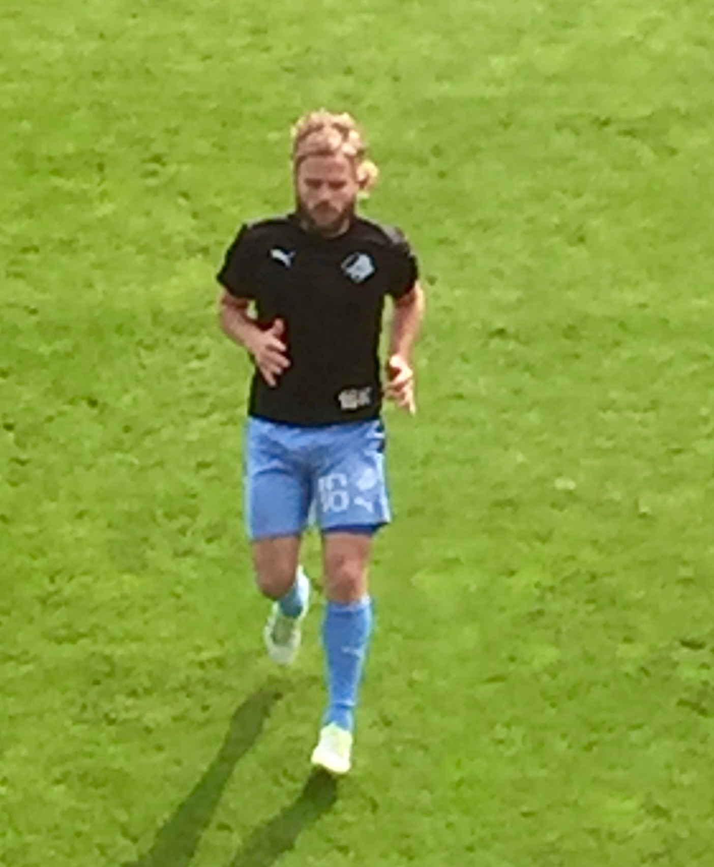 Kasper Fisker